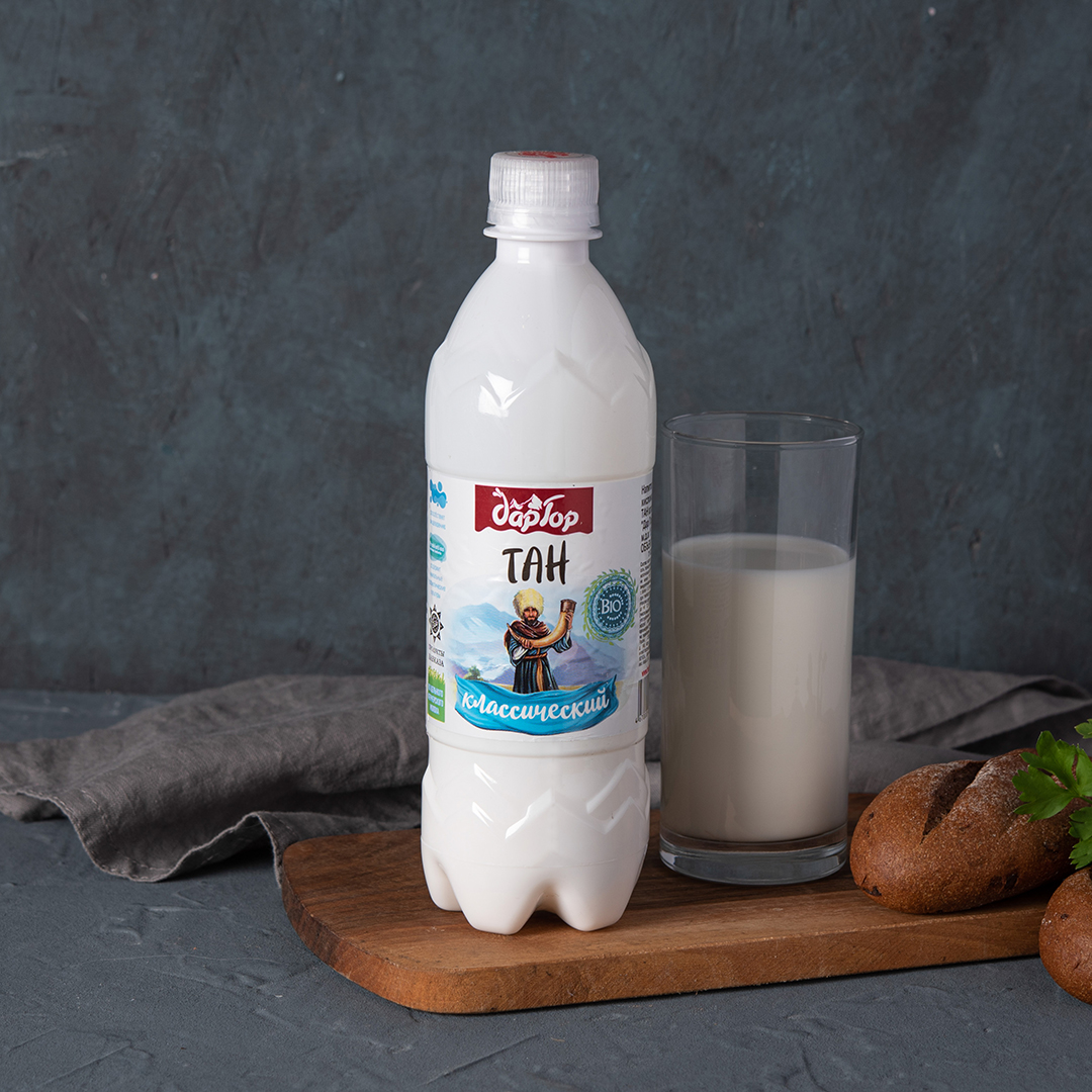 Тан классический армянский